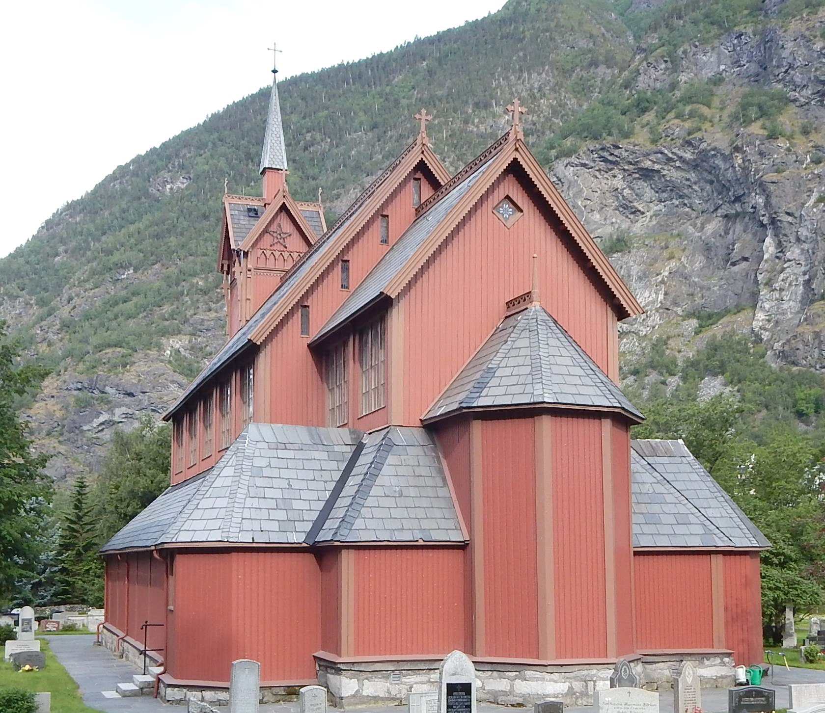 Årdal kirke